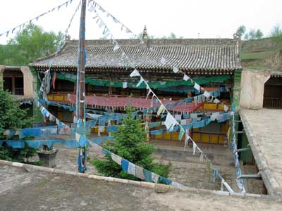 Das Geburtshaus des 14. Dalai Lama im Dorf Taktser (Hongya cun), Amdo (Provinz Qinghai/ VR China) Foto: A. Gruschke (Freiburg)